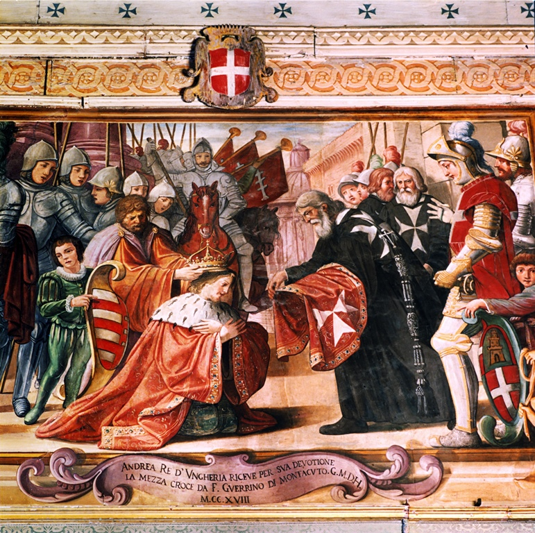 Falfestmény a Valletta-i Nagymesterek Palotájában, Málta